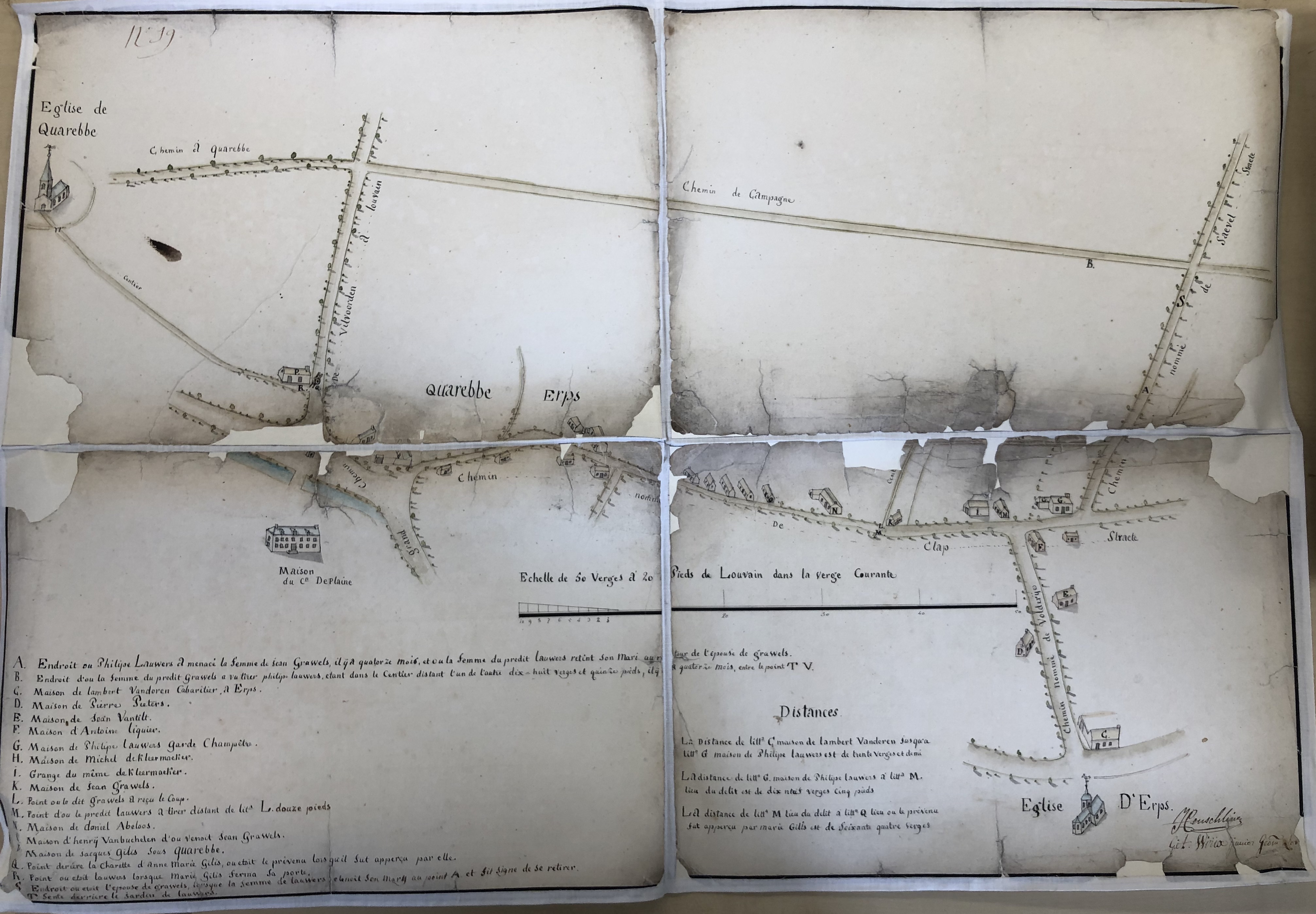 Plan Erps-Kwerps - Dossier judiciaire de 1800 - Condamné par la cour d'assise Philippe Lauwers